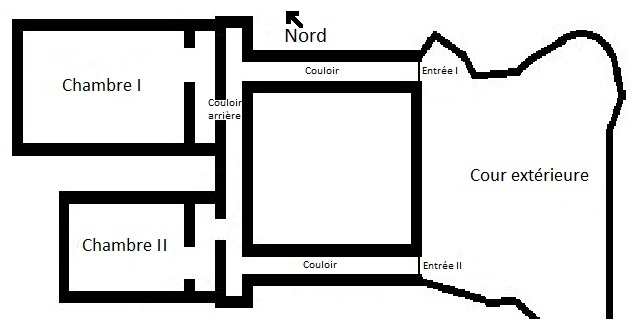 Plan du magasin caverne du fort de Planoise, à Besançon (Doubs, France).